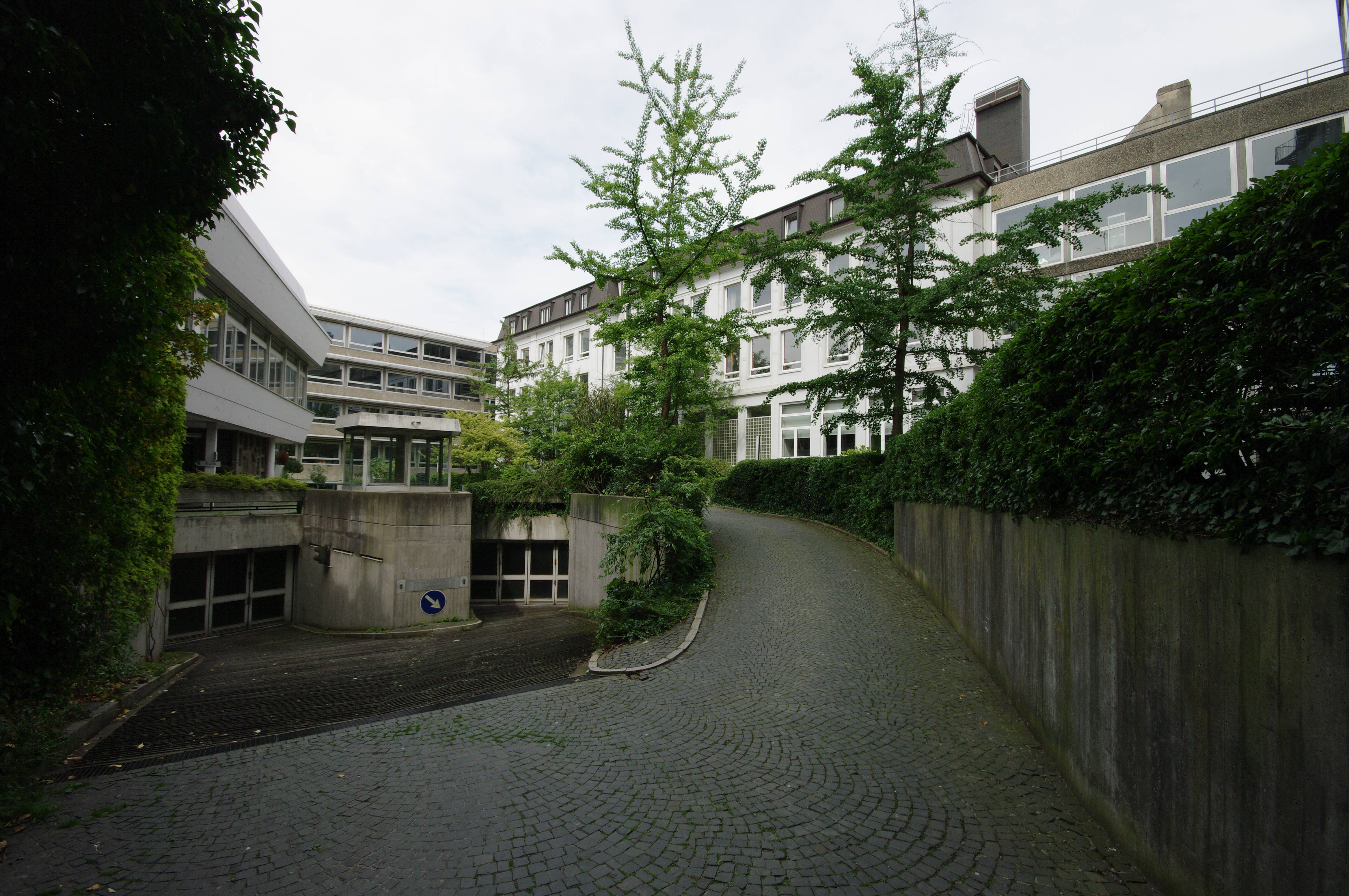 Das Ursula Gymnasium in Freiburg Blick in den Innenbereich